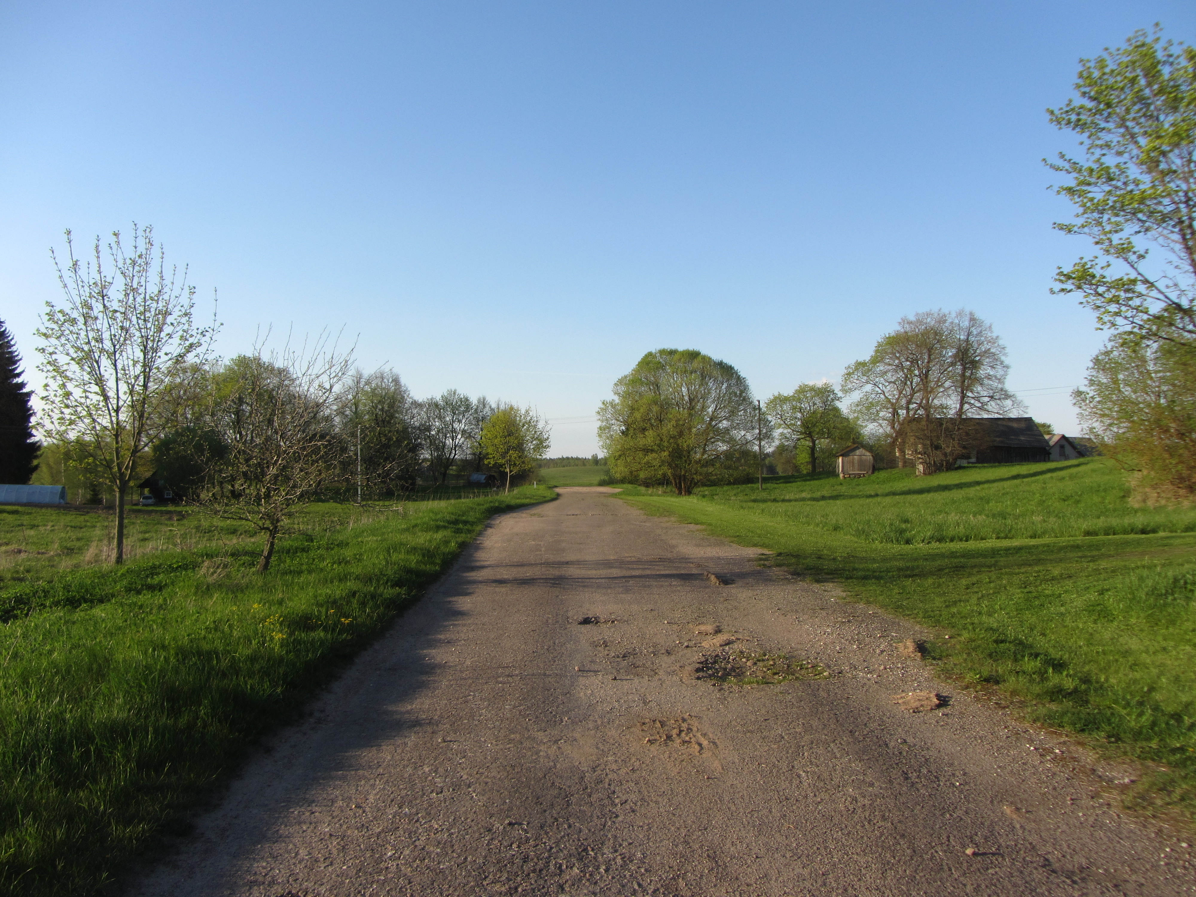 Suginčių sen., Lithuania